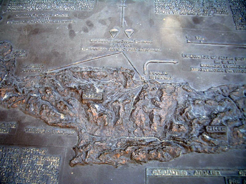 Plan des deutschen Überfalls auf Kreta, Befreiungsdenkmal in Hieraklion